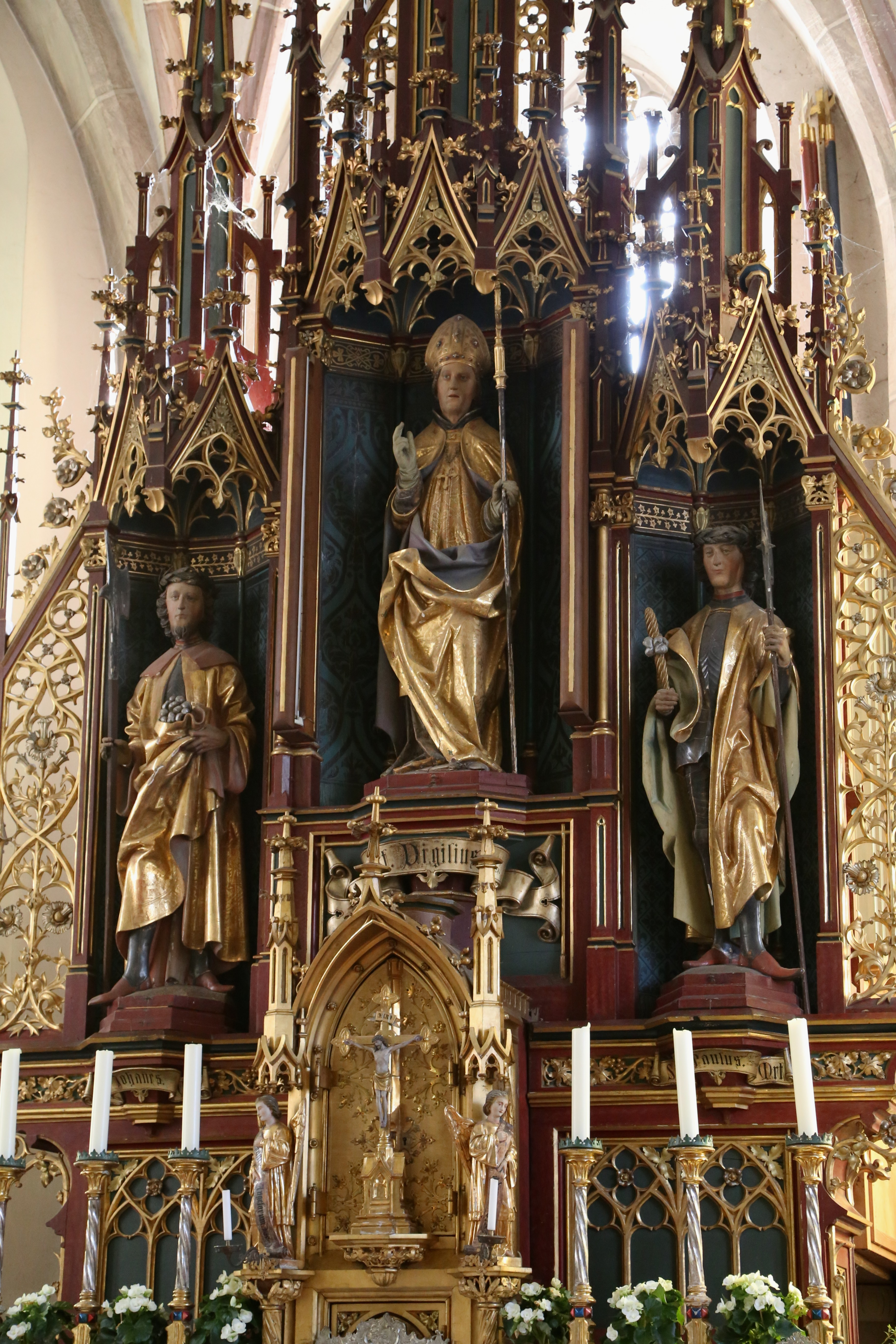 Haunpoldstraße 27, Kirchdorf a. Haunpold; Katholische Pfarrkirche St. Vigilius, Saalbau mit oktogonalem Westturm mit spitzhelm, spätgotische Anlage von Hans Holnstainer, teilweise barockisiert und regotisiert, 1470, 1697, 1875, 1927; mit Ausstattung